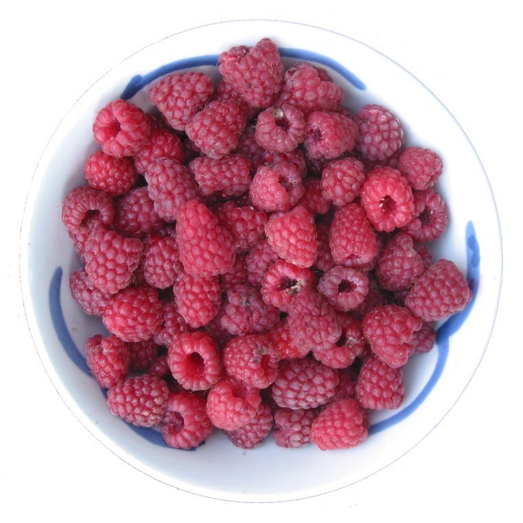 zelfgemaakte foto van frambozenvruchten; eind juli